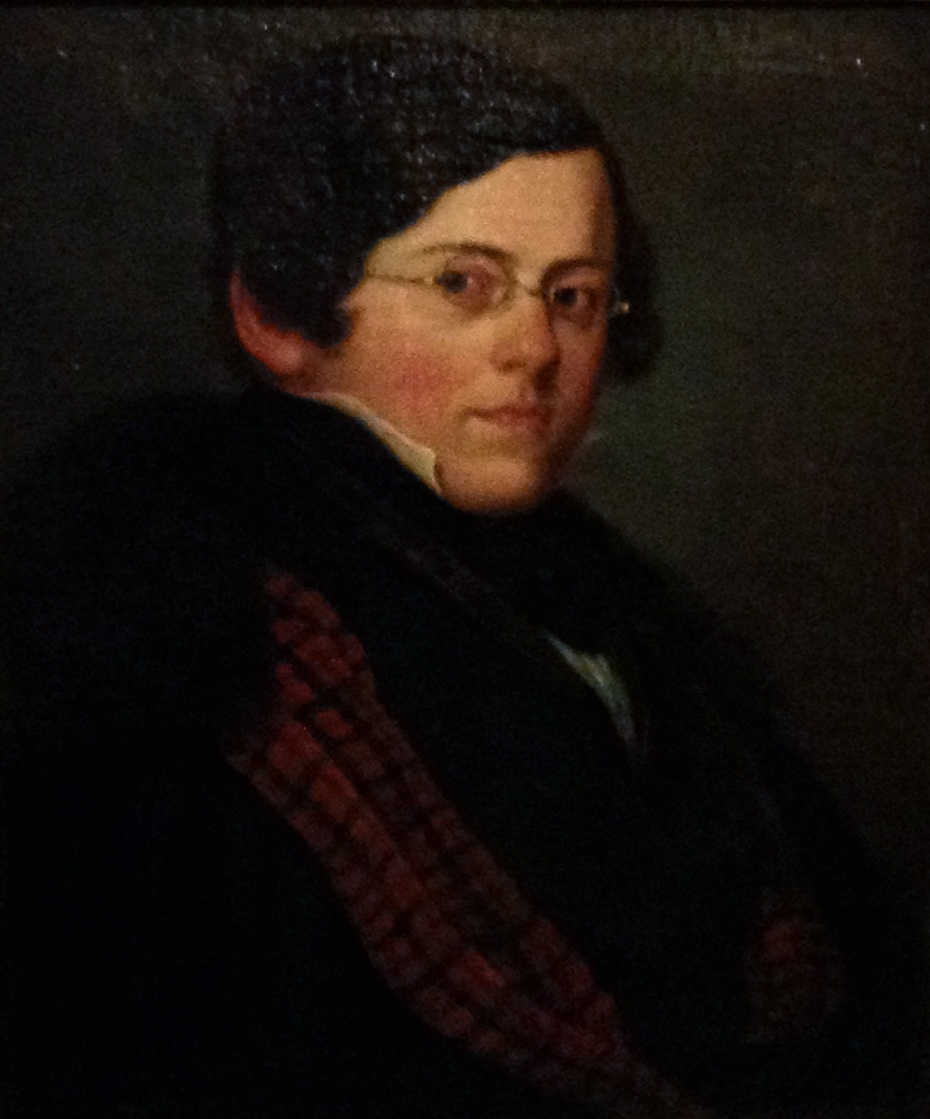 Melchior Joller um 1860